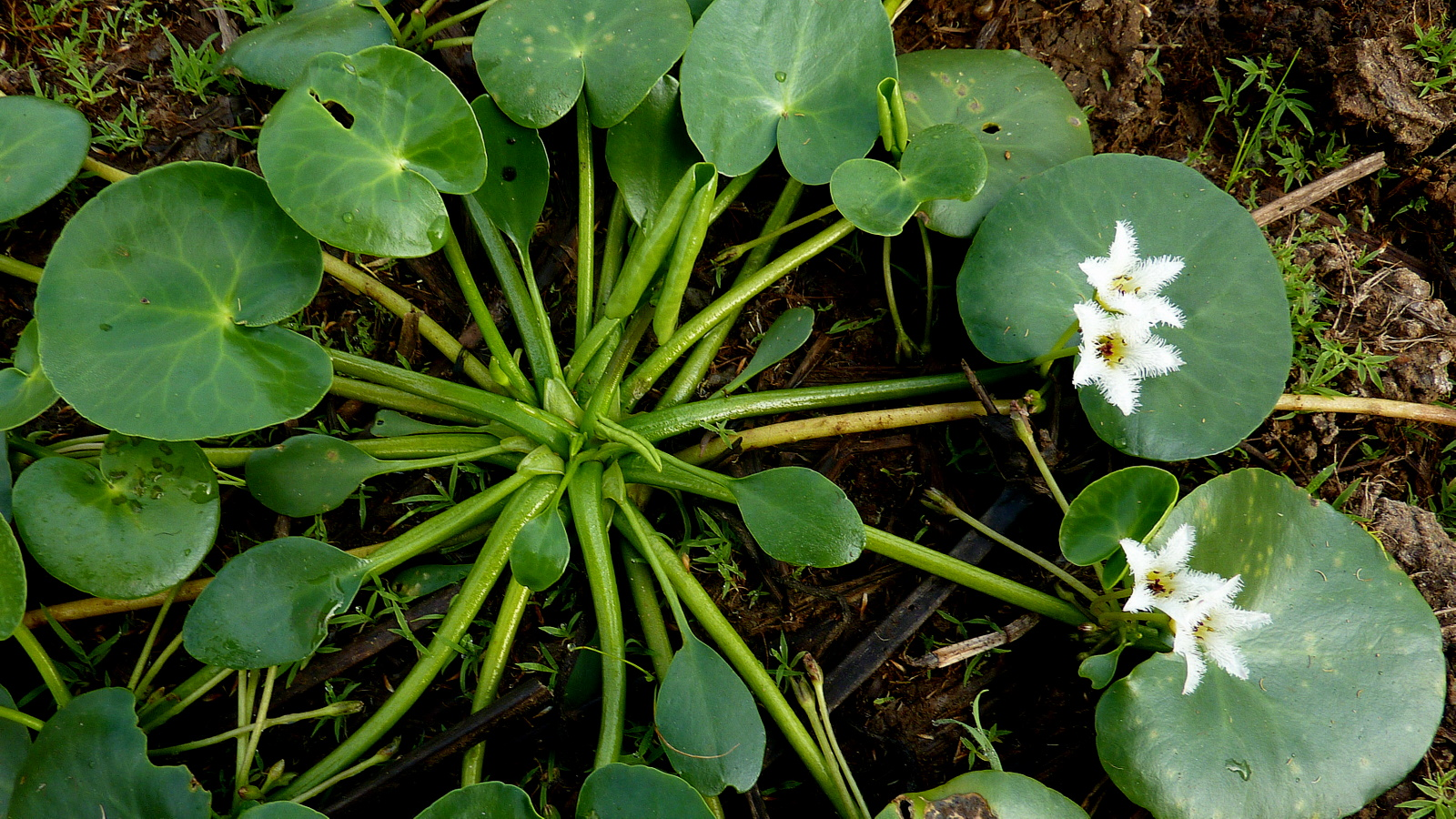 Nymphoides indica (L.) Kuntze